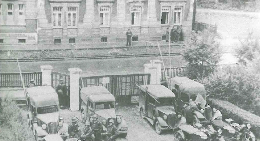 Samochody "radio" 10 Brygady Kawalerii. Od lewej: 508/518 ze sztywnym, wysokim nadwoziem, drewniano-brezentowym, 508/518 z nadwoziem furgon i opończą brezentową, 508 III z nadwoziem drewniano-metalowym i 508/518 taki sam, jak ten z lewej. [opis oryginalny]